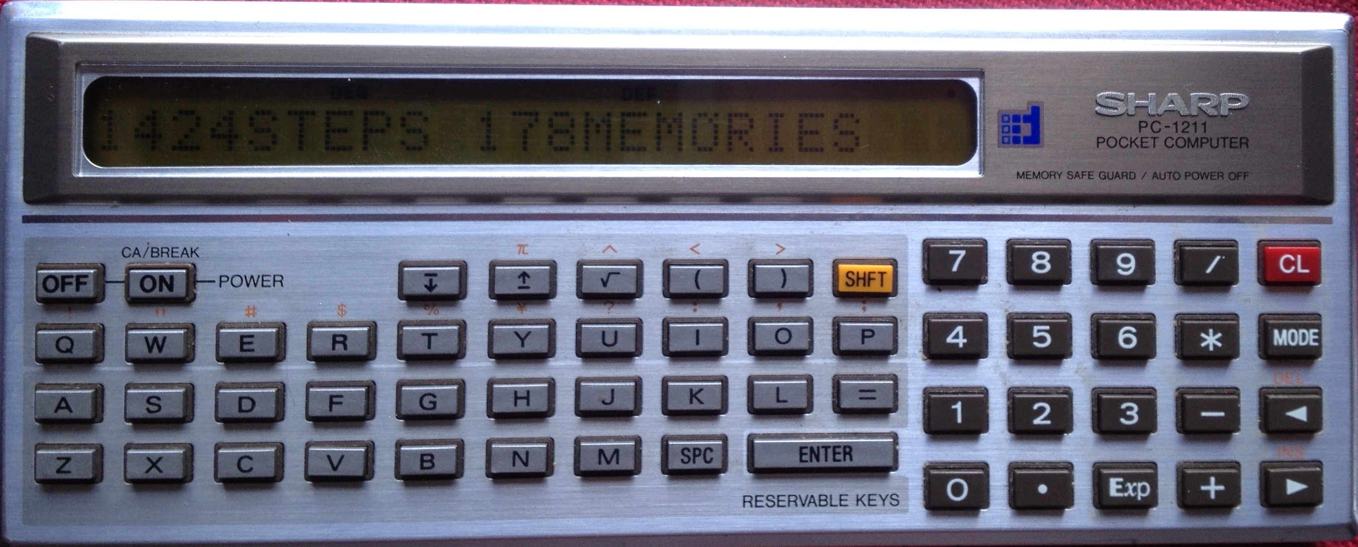 photographie d'un SHARP PC1211